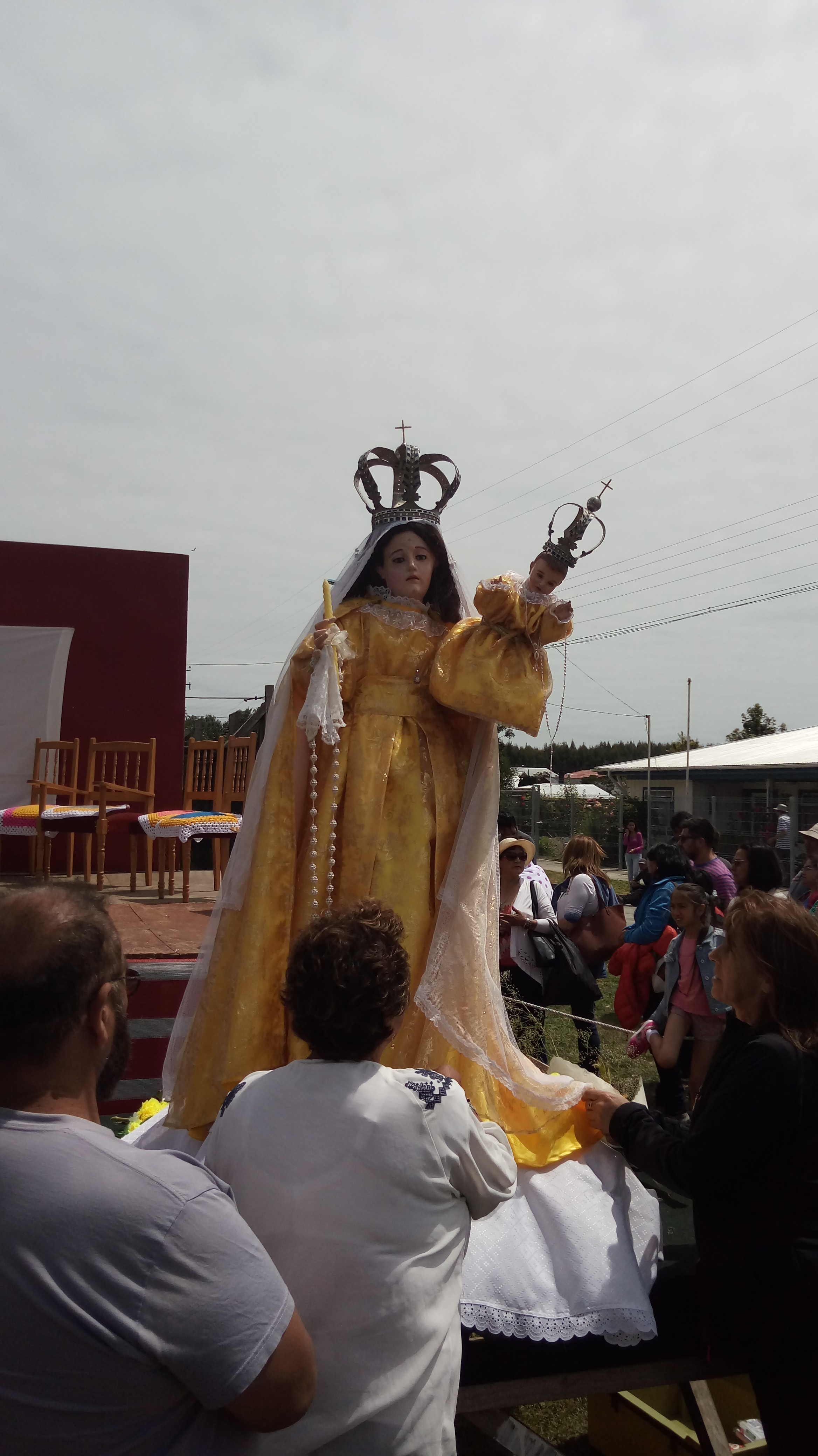 Fiesta religiosa en Carelmapu